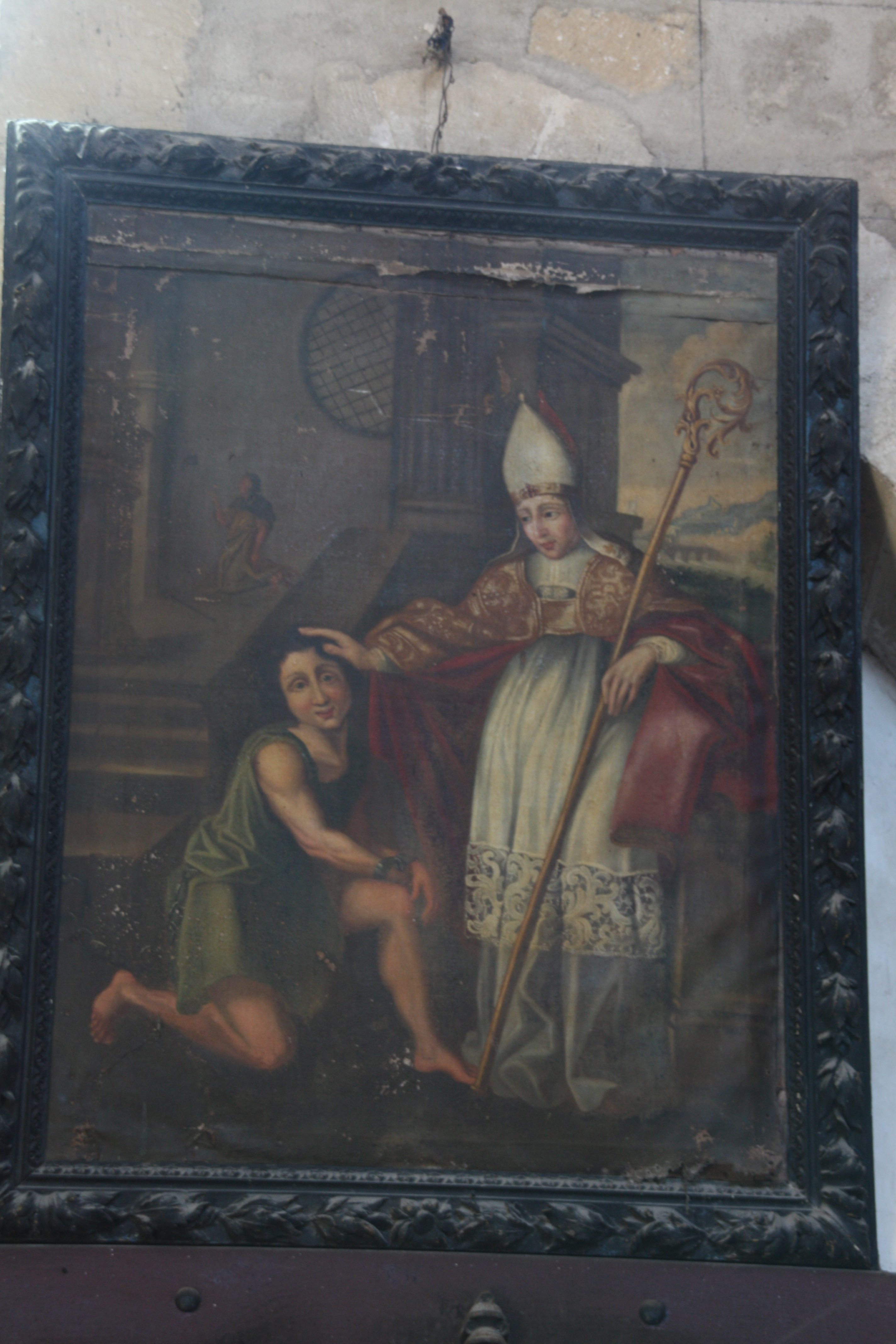 Église romane à Saint-Menoux, Allier, France